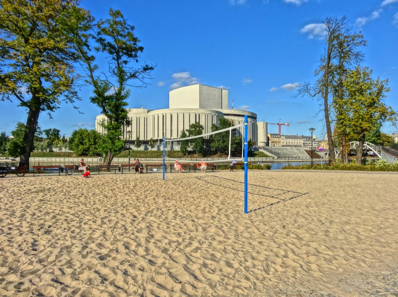 Plaża miejska na Wyspie Młyńskiej w Bydgoszczy